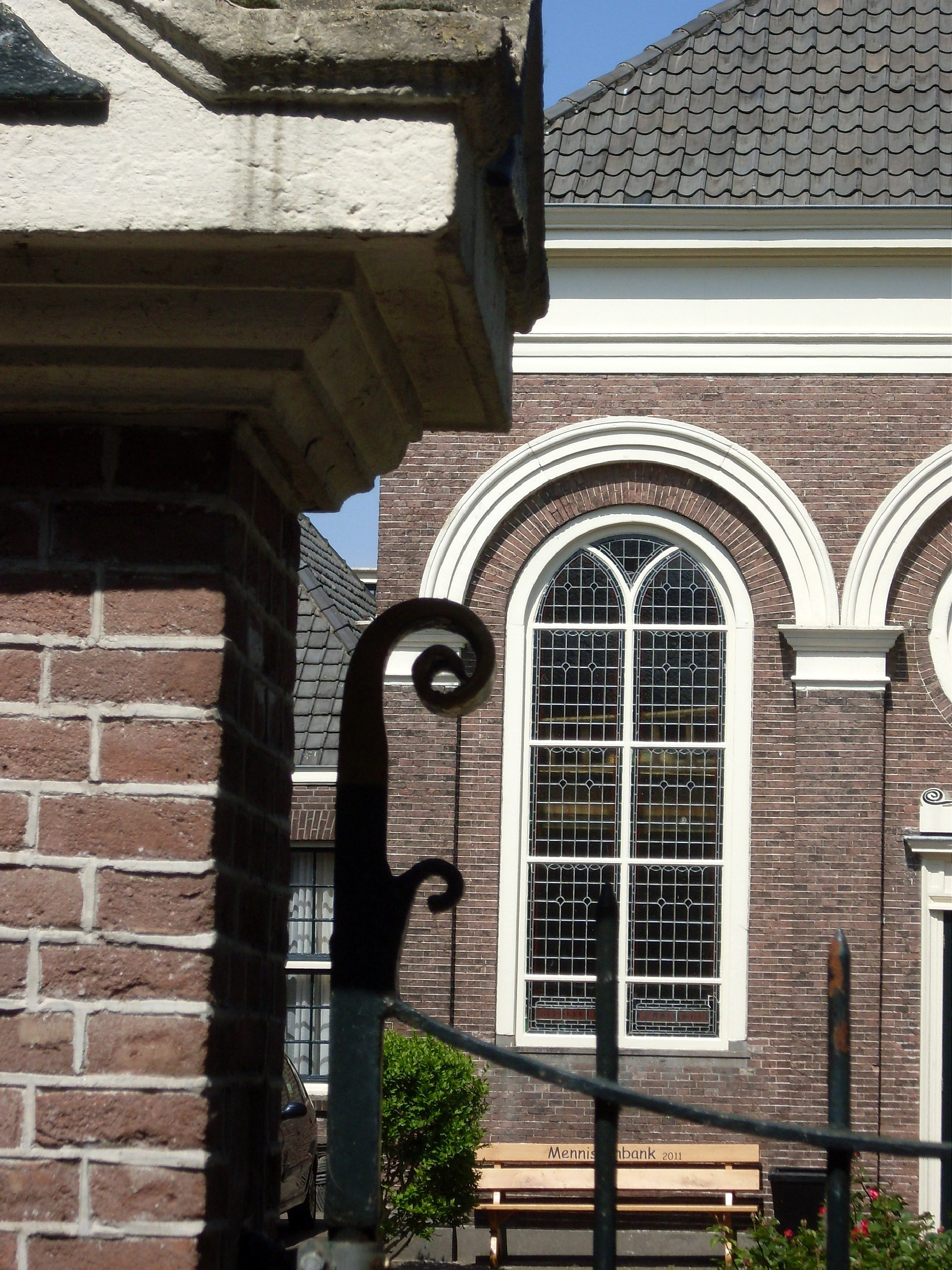 Het doopsgezinde kerkje